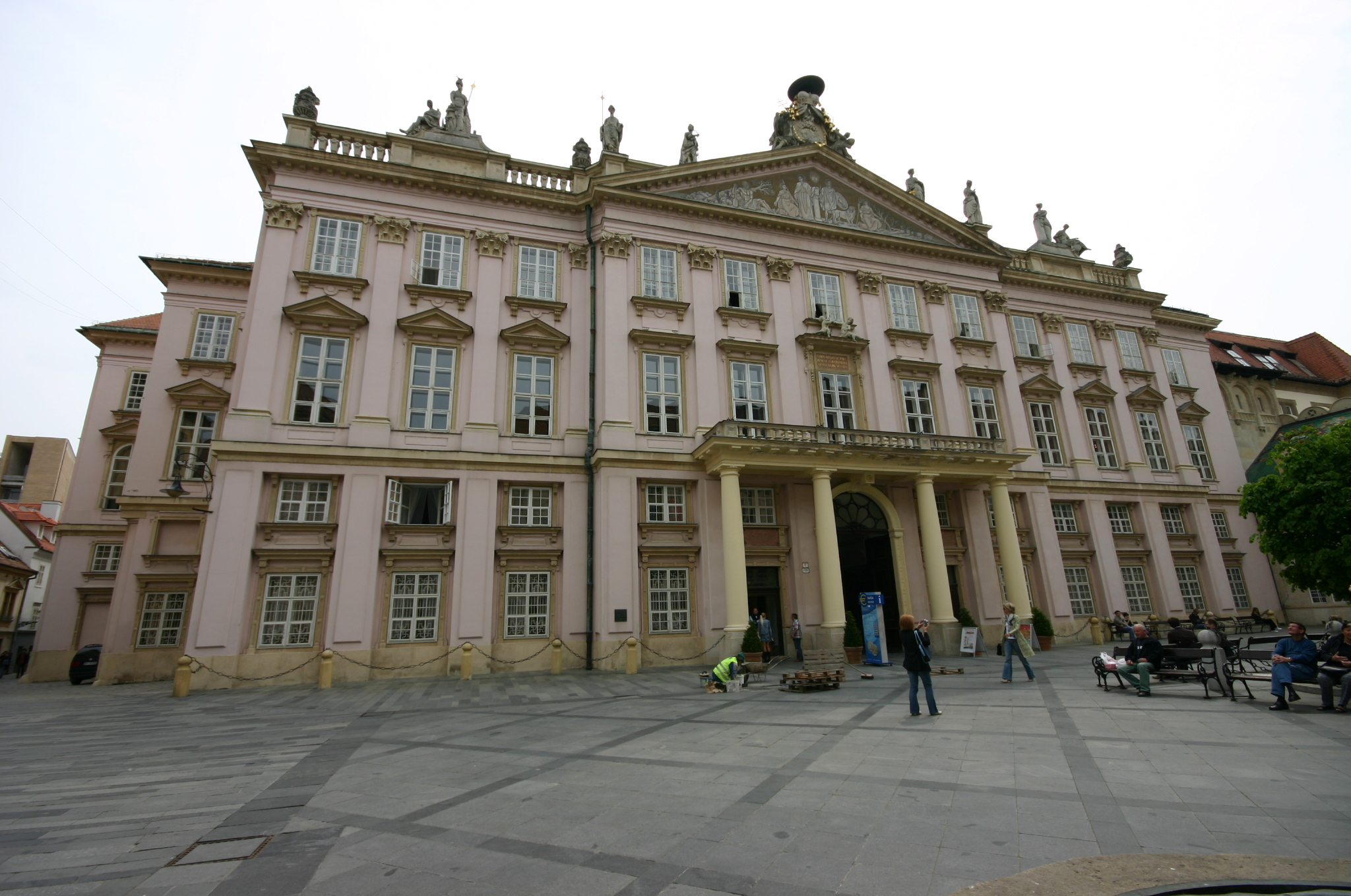 Primatialpalais